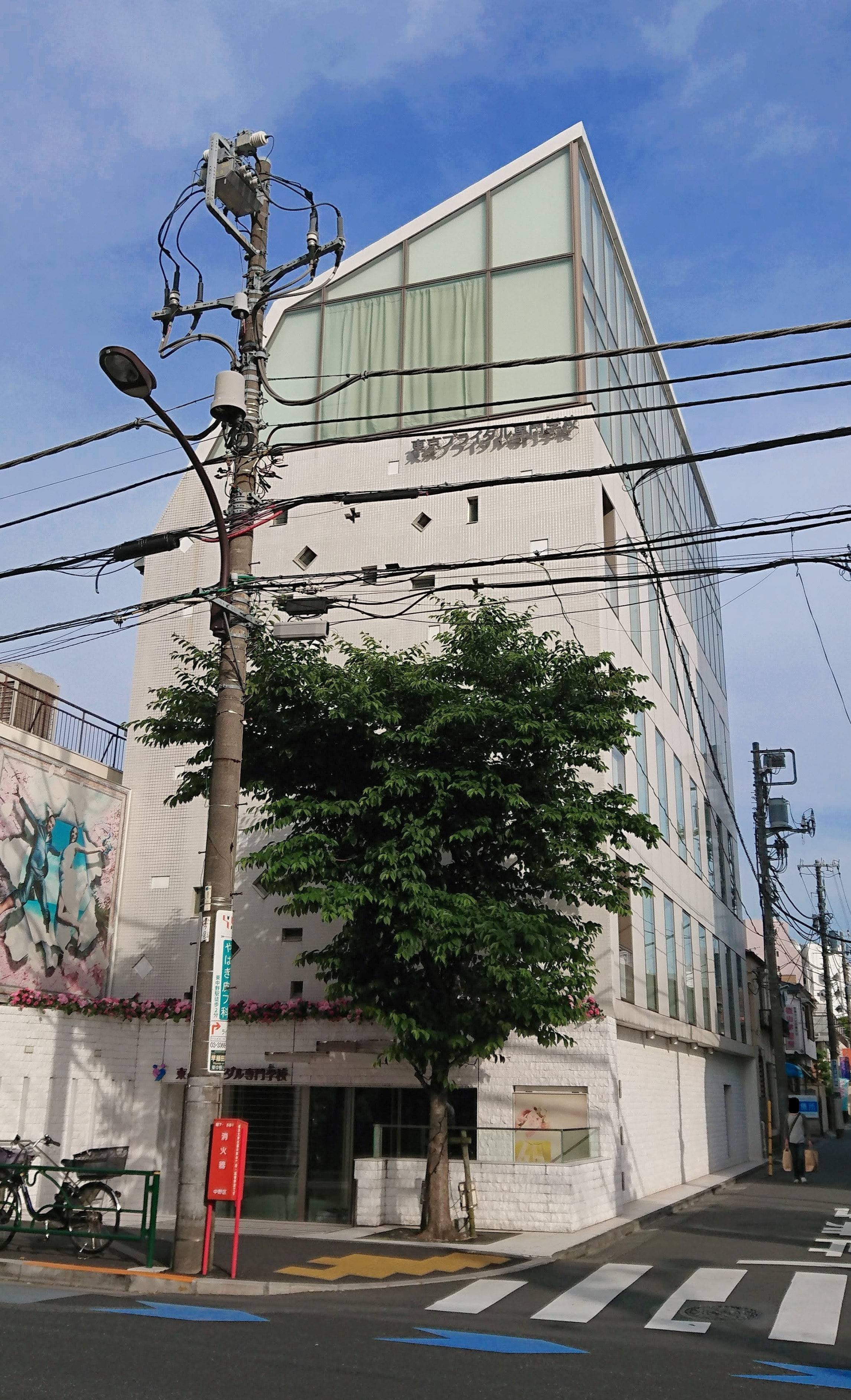 東京ブライダル専門学校の校舎外観